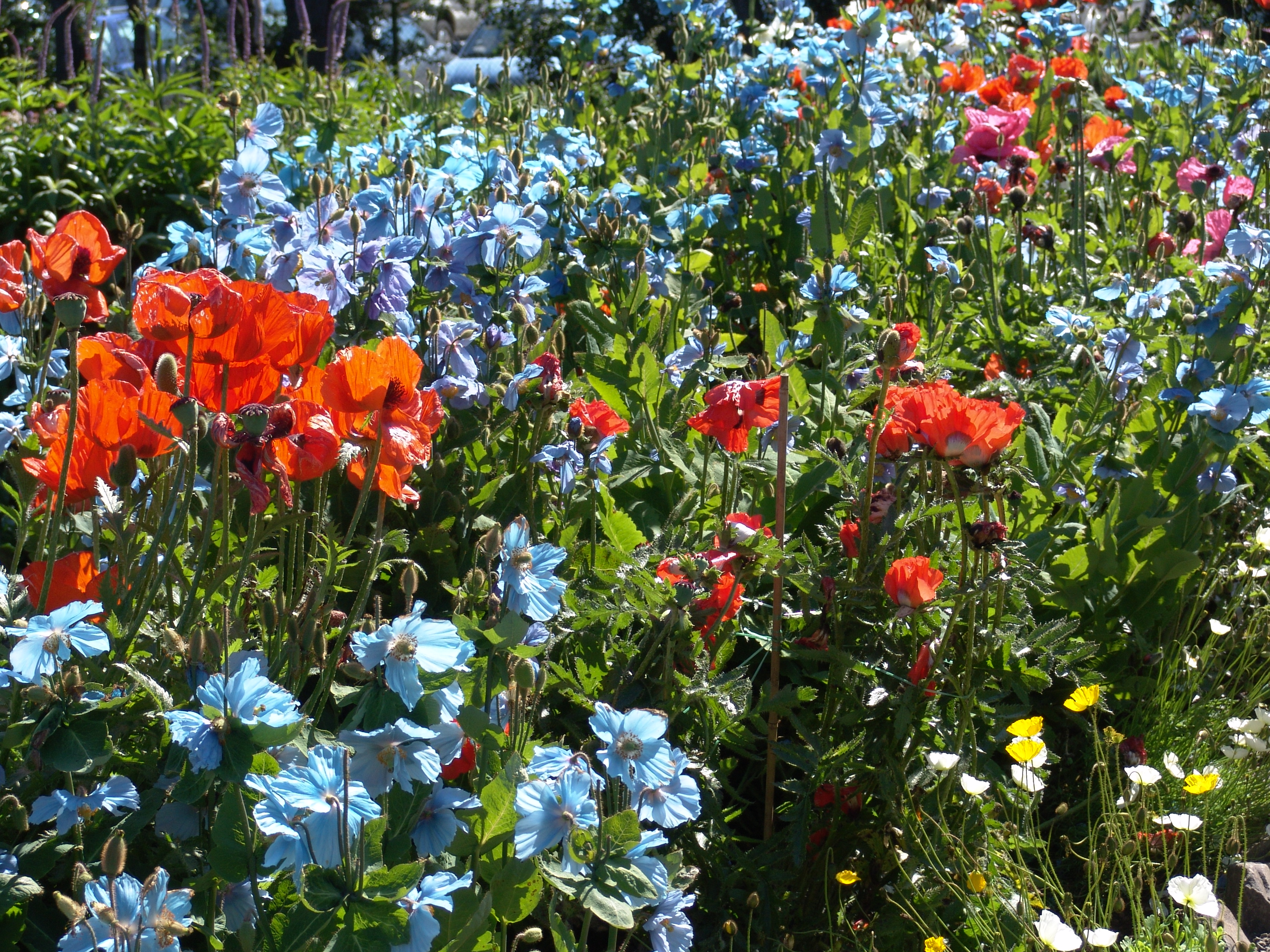 Island, Botanischer Garten Akureyri.